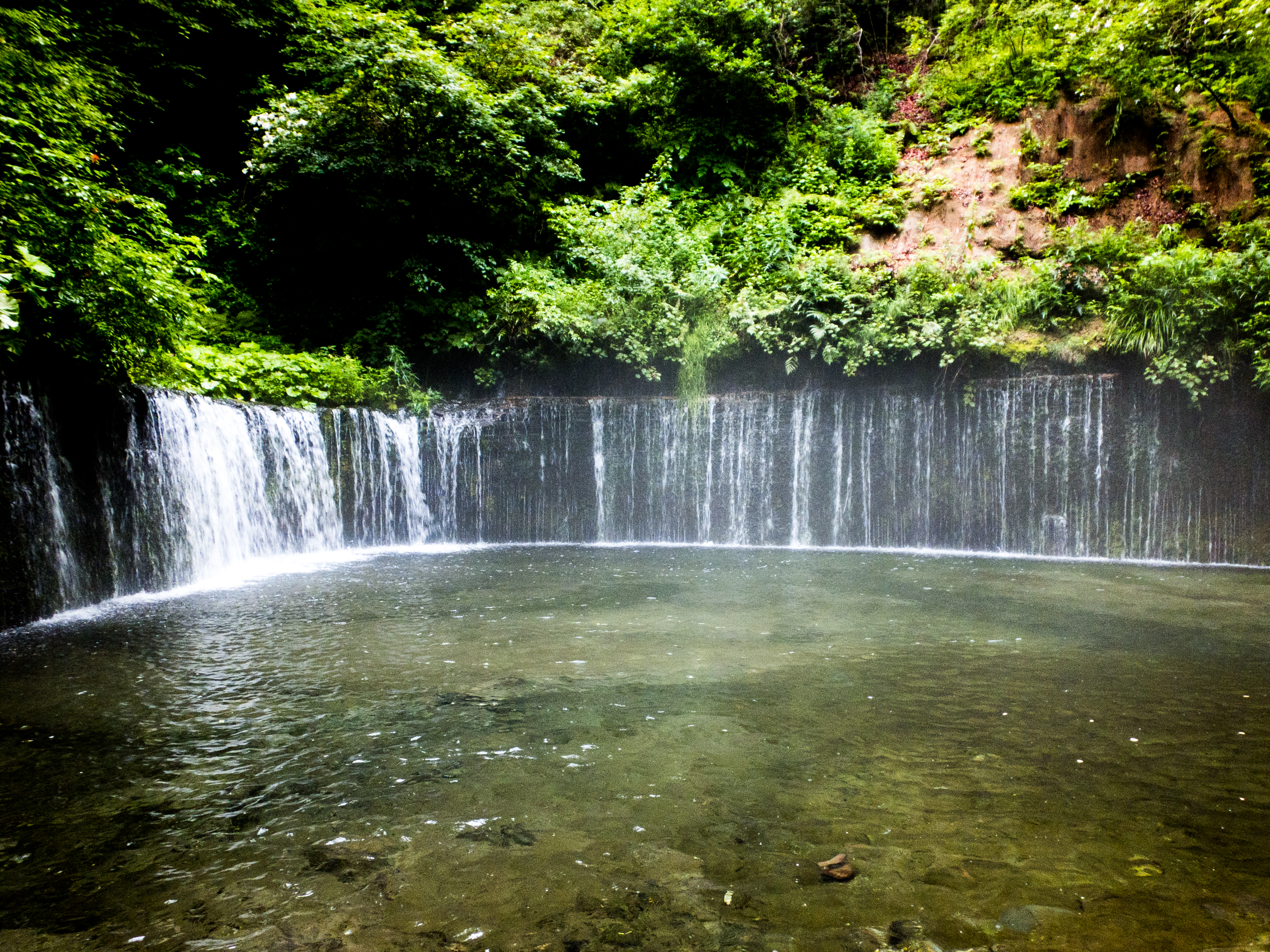 白糸の滝（長野県）